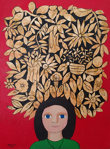 Obra Niña con elemento del pintor Félix Aráuz